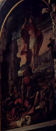 Ressurreição de Cristo, pintura de Jorge Afonso